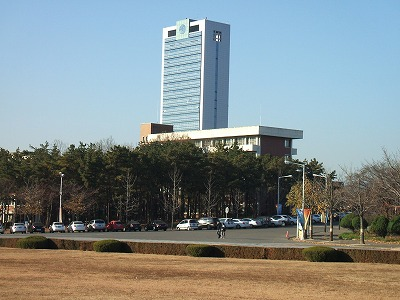 嶺南大学校慶山キャンパス（大韓民国慶尚北道慶山市）中央図書館